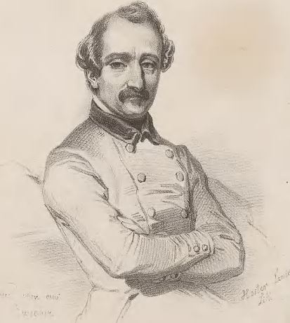 Ecuyer Français